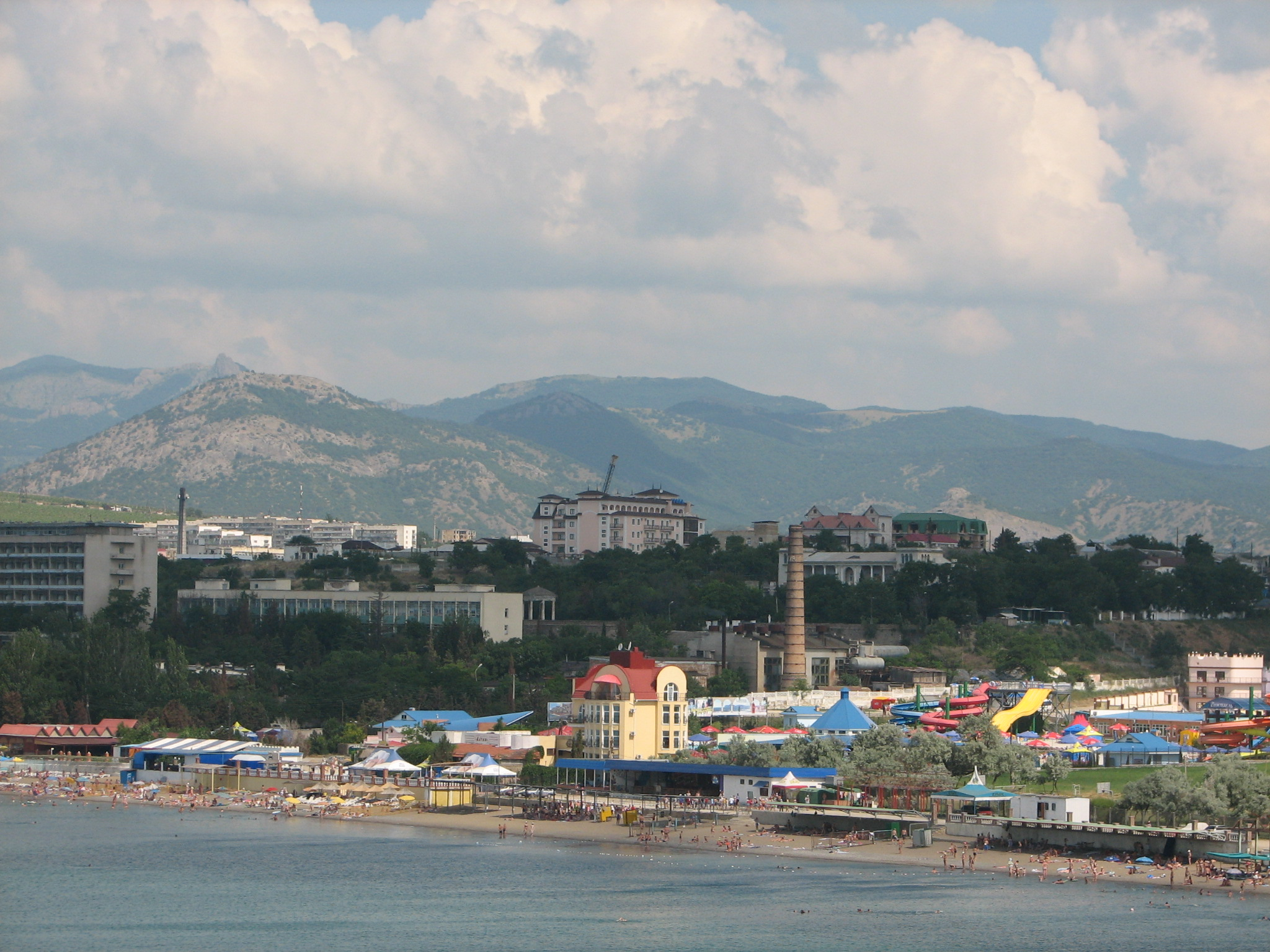 Фотография с восточного берега судакской бухты